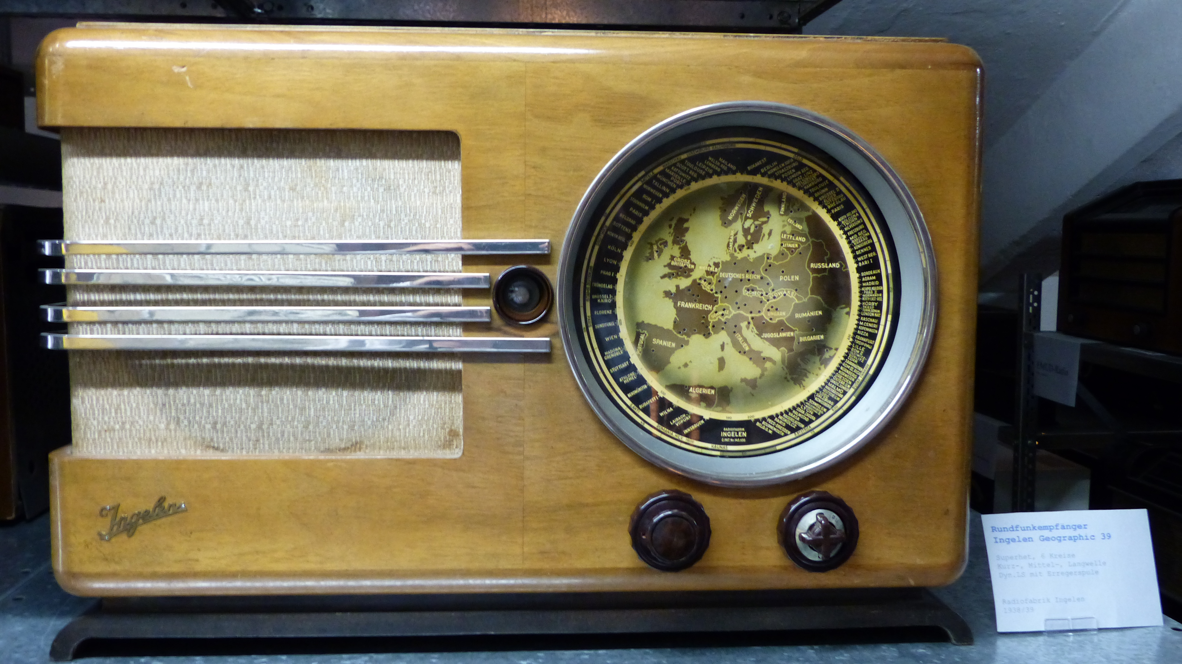 Radio-Depot der Technischen Sammlungen Dresden